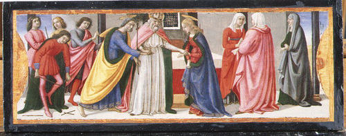 David ghirlandaio, sposalizio della vergine